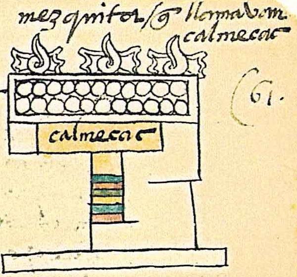 Calmecac glyph (Mendoza codex, folio 61r).